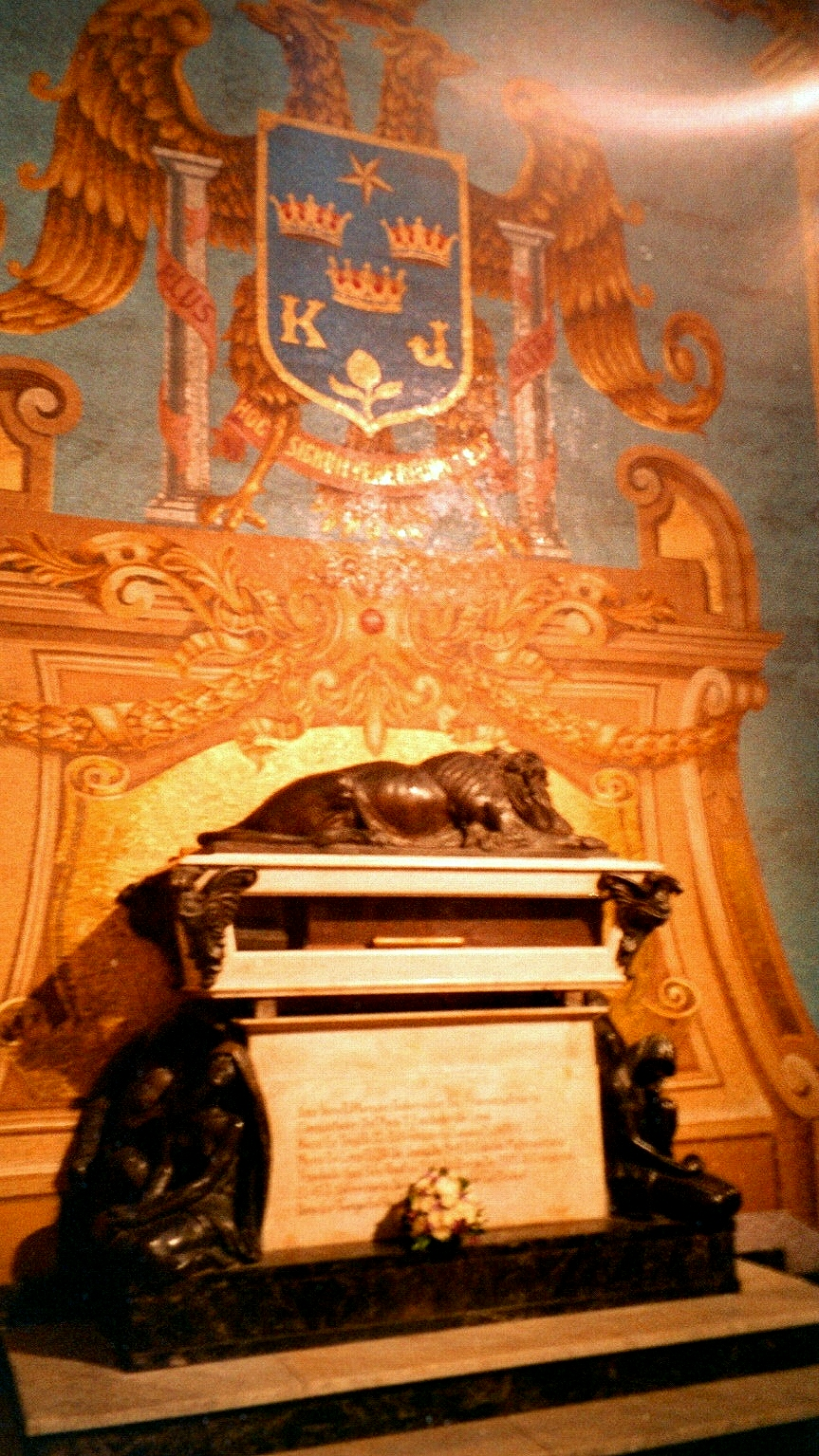 Das Grab des Francisco Pizarro in Lima